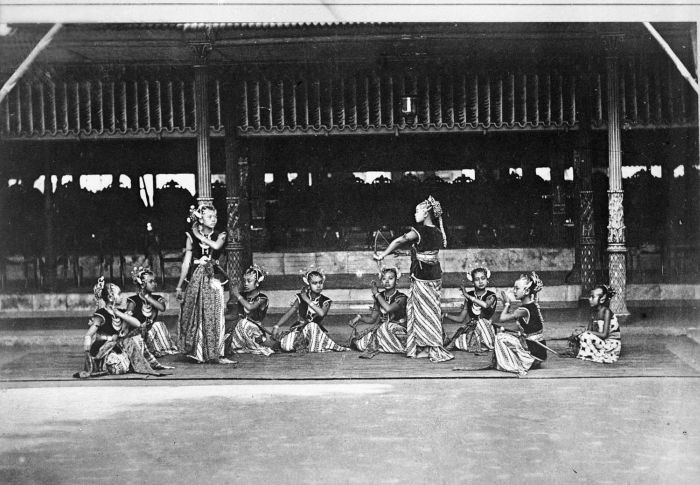 Repronegatief. Bedaya hofdanseressen in de kraton van de Sultan van Jogjakarta